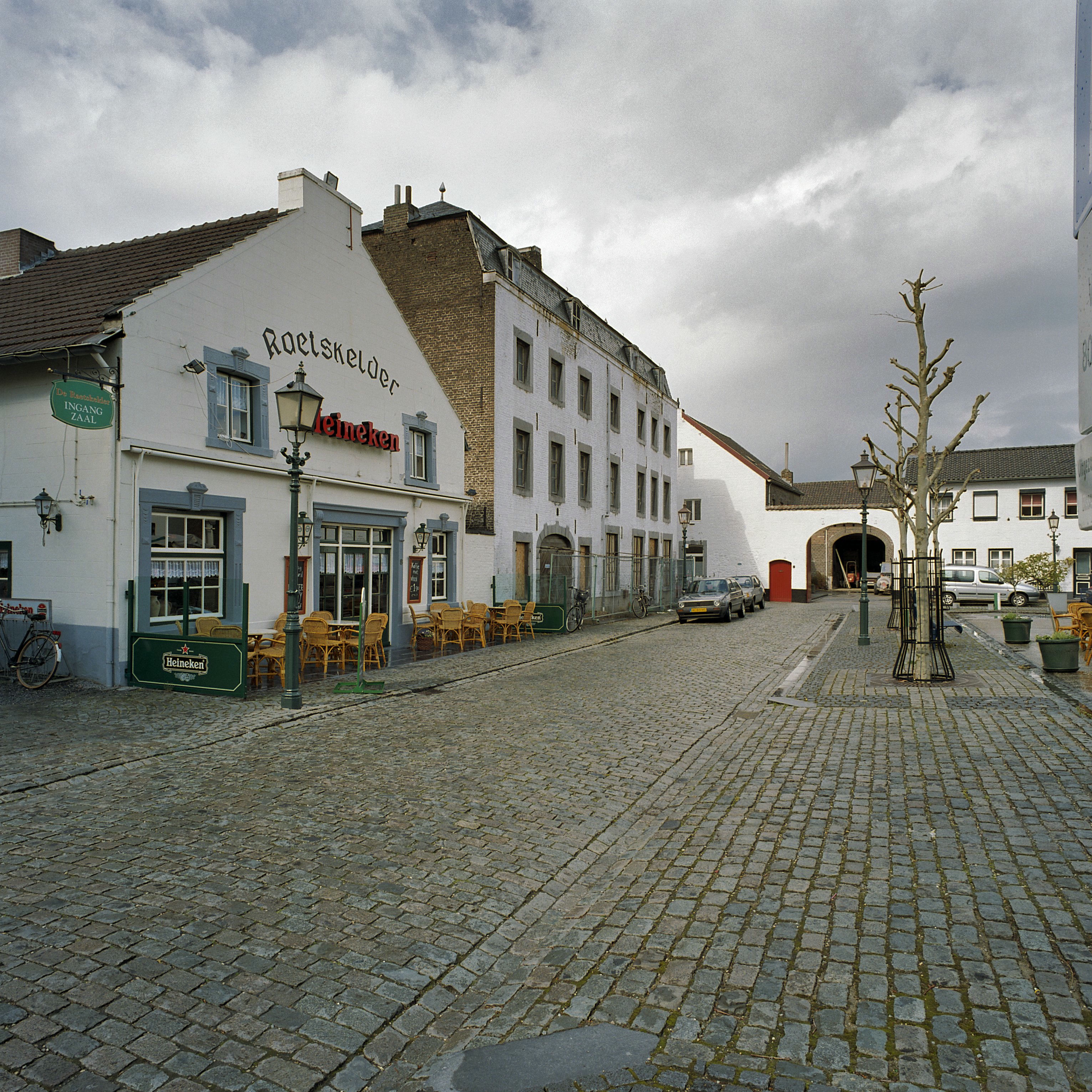 Overzicht Vroenhof 6 met omgeving